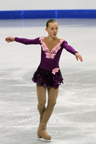 Елизавета Уколова (Чехия) на чемпионате мира по фигурному катанию среди юниоров 2012